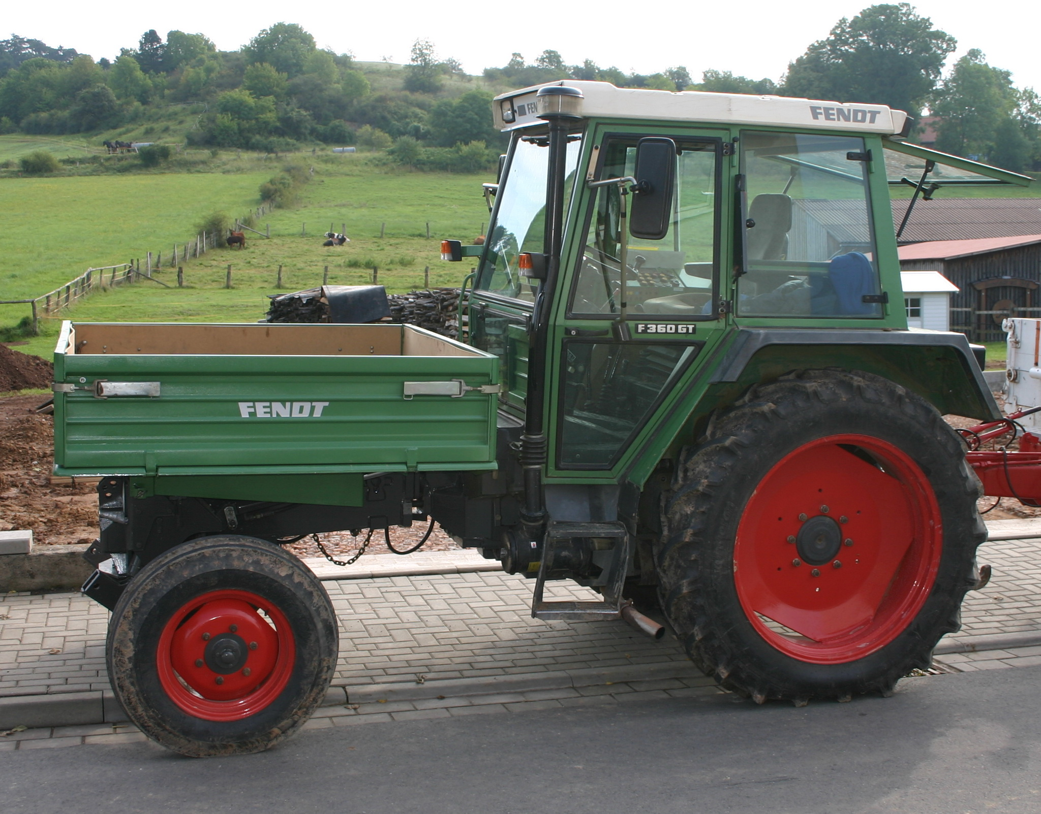 Fendt GT F360GT